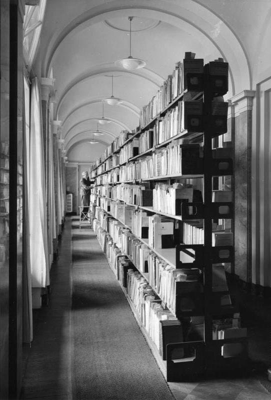 West Berlin: Ibero-Amerikanische Bibliothek, Buch-Ablage